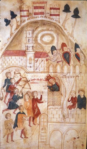 Konstancie Sicilská v Salernu